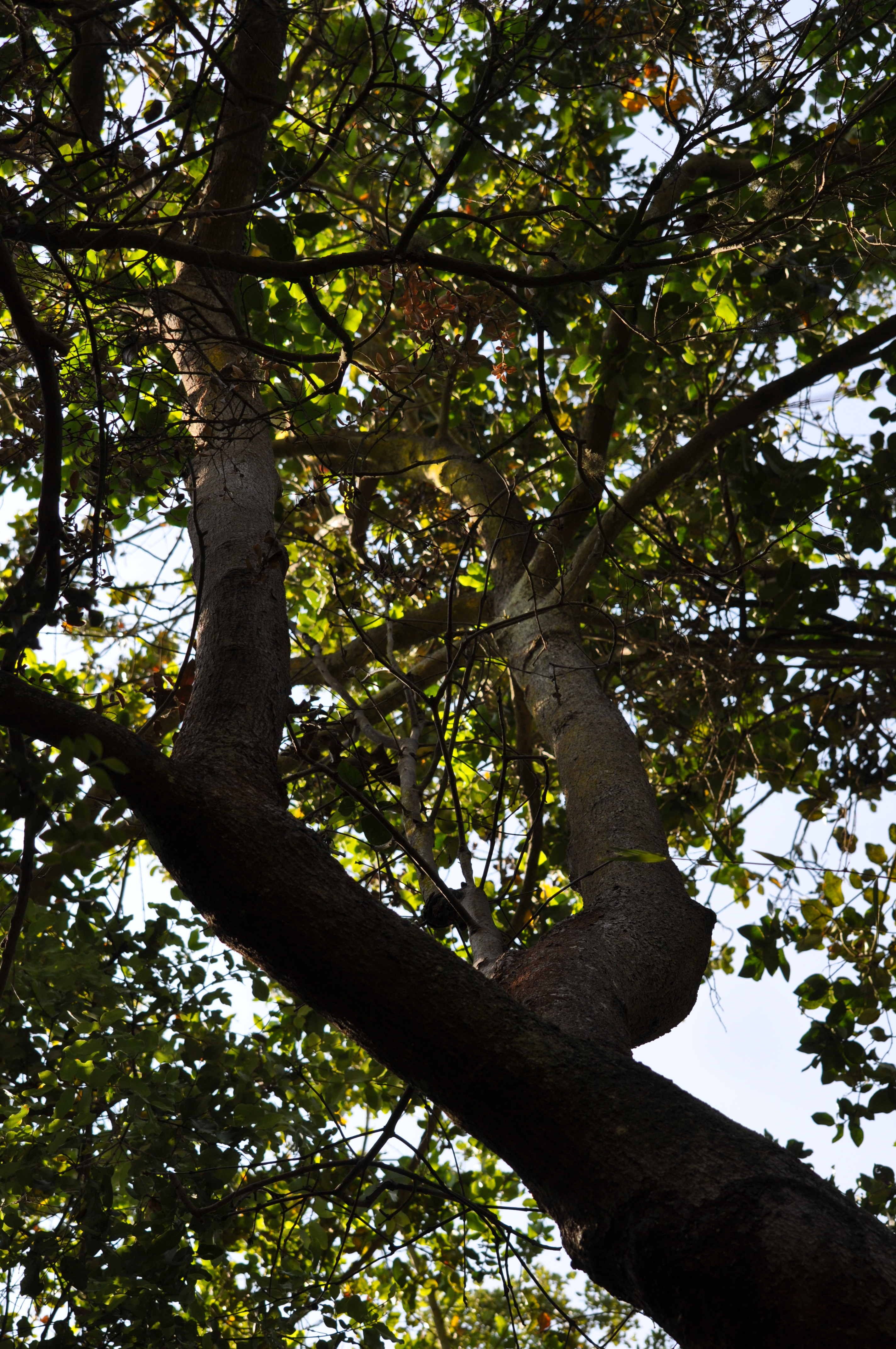 Beilschmiedia miersii (belloto) en el parque nacional La Campana, Región de Valparaíso, Chile. Circuito La Canasta.